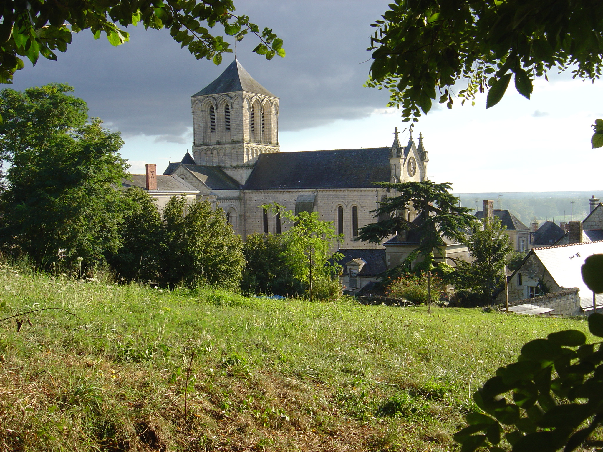 Eglise de Brion dans le maine et loire